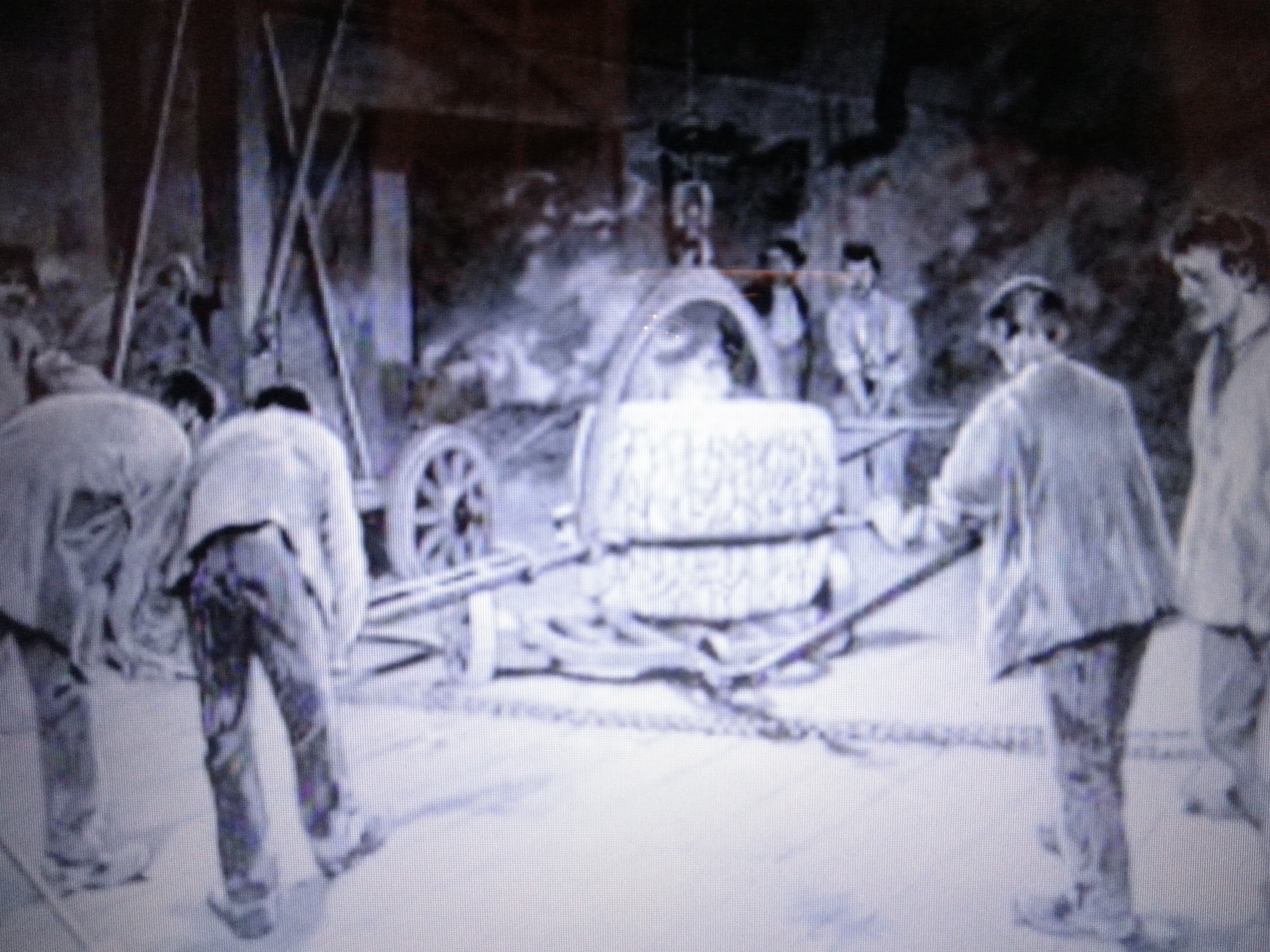 1898 creusets